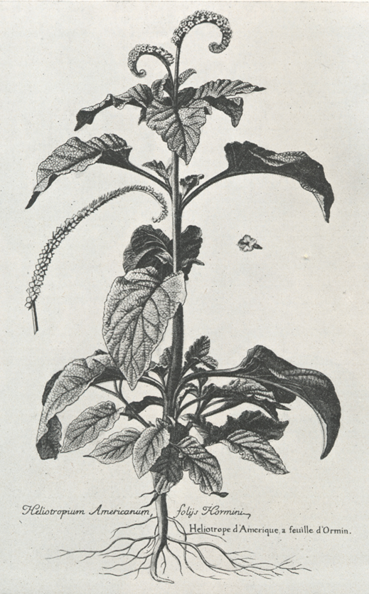 Plant : "Heliotropium Americanum foliis Hormini" (= Heliotropium procumbens?) Heliotropium indicum[1]